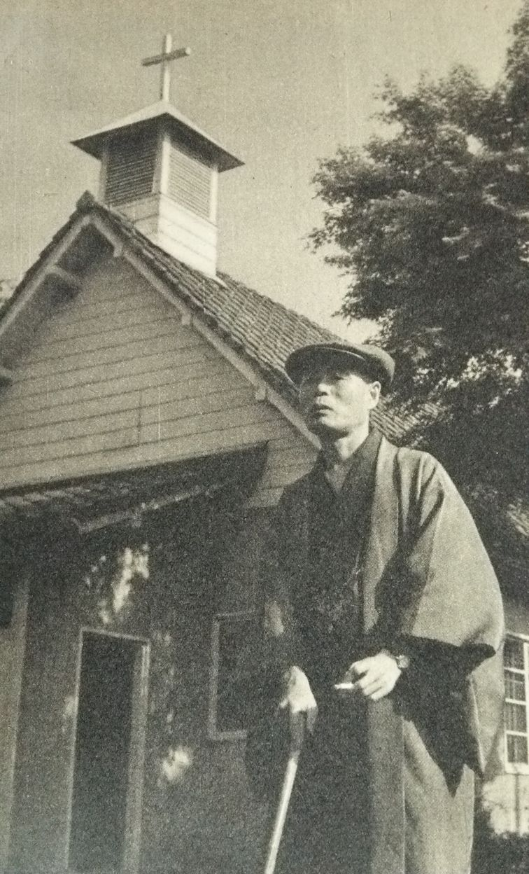 上林暁（聖ヨハネ病院にて）